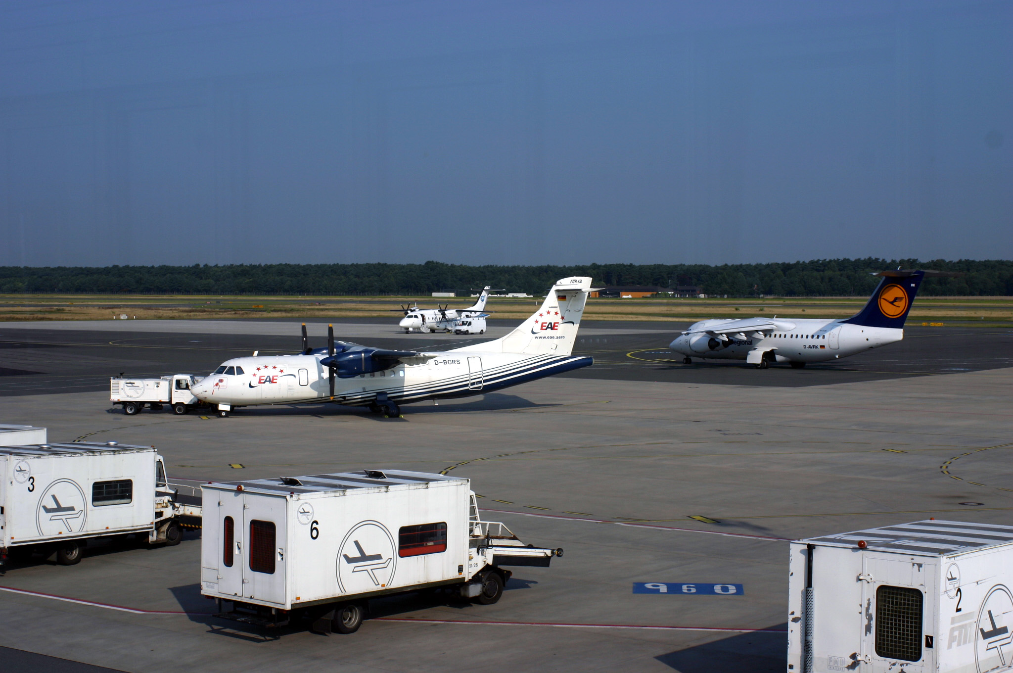 Flughafen Münster Osnabrück (FMO) European Air Express (EAE) ATR 42 (D-BCRS) Lufthansa Regional Avro RJ85 (D-AVRK)